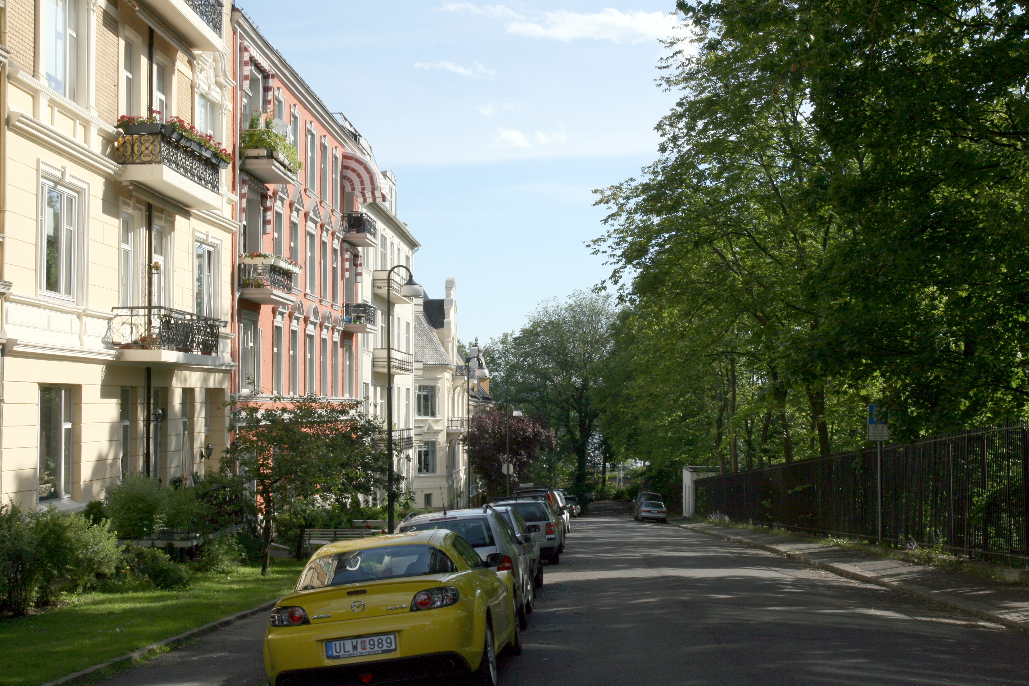 Leiv Erikssons gate på Skillebekk i Oslo.